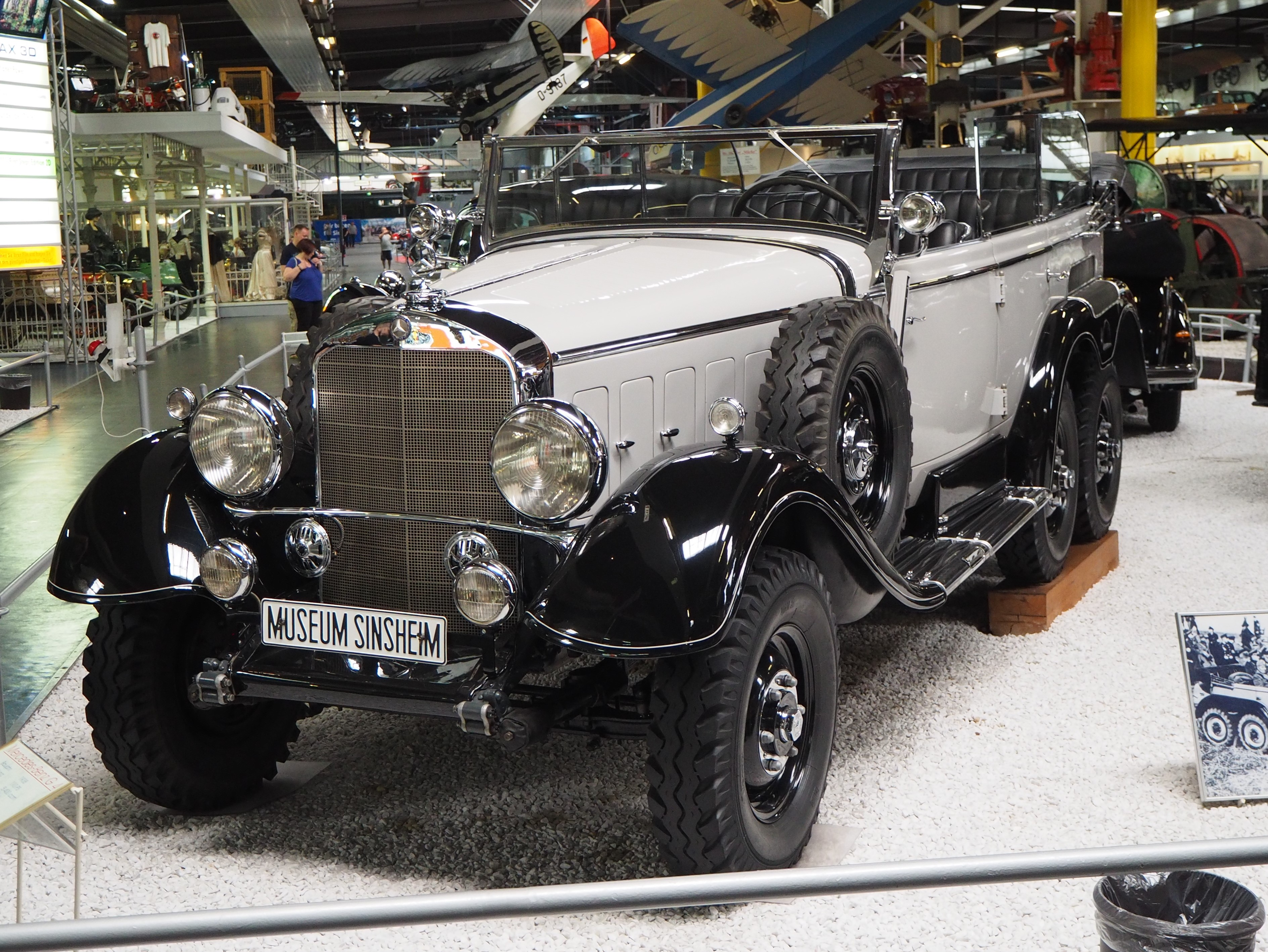 1938 Mercedes-Benz G4